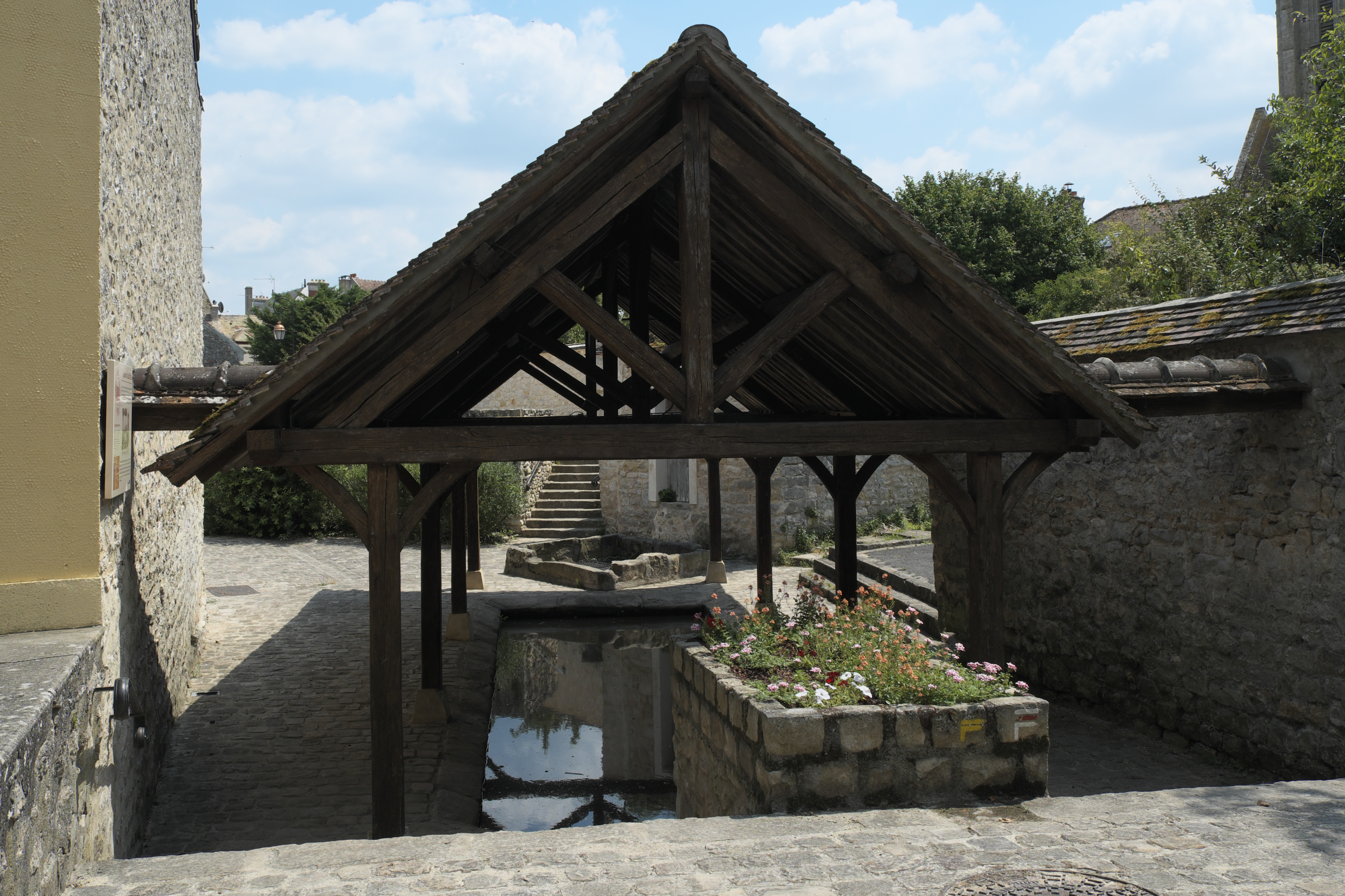 Lavoir du Coul d’Eau in Milly-la-Forêt im Département Essonne (Île-de-France/Frankreich)